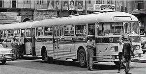 صورة تاريخية لأحد الناقلات في ساحة الشهداء في بيروت 1969